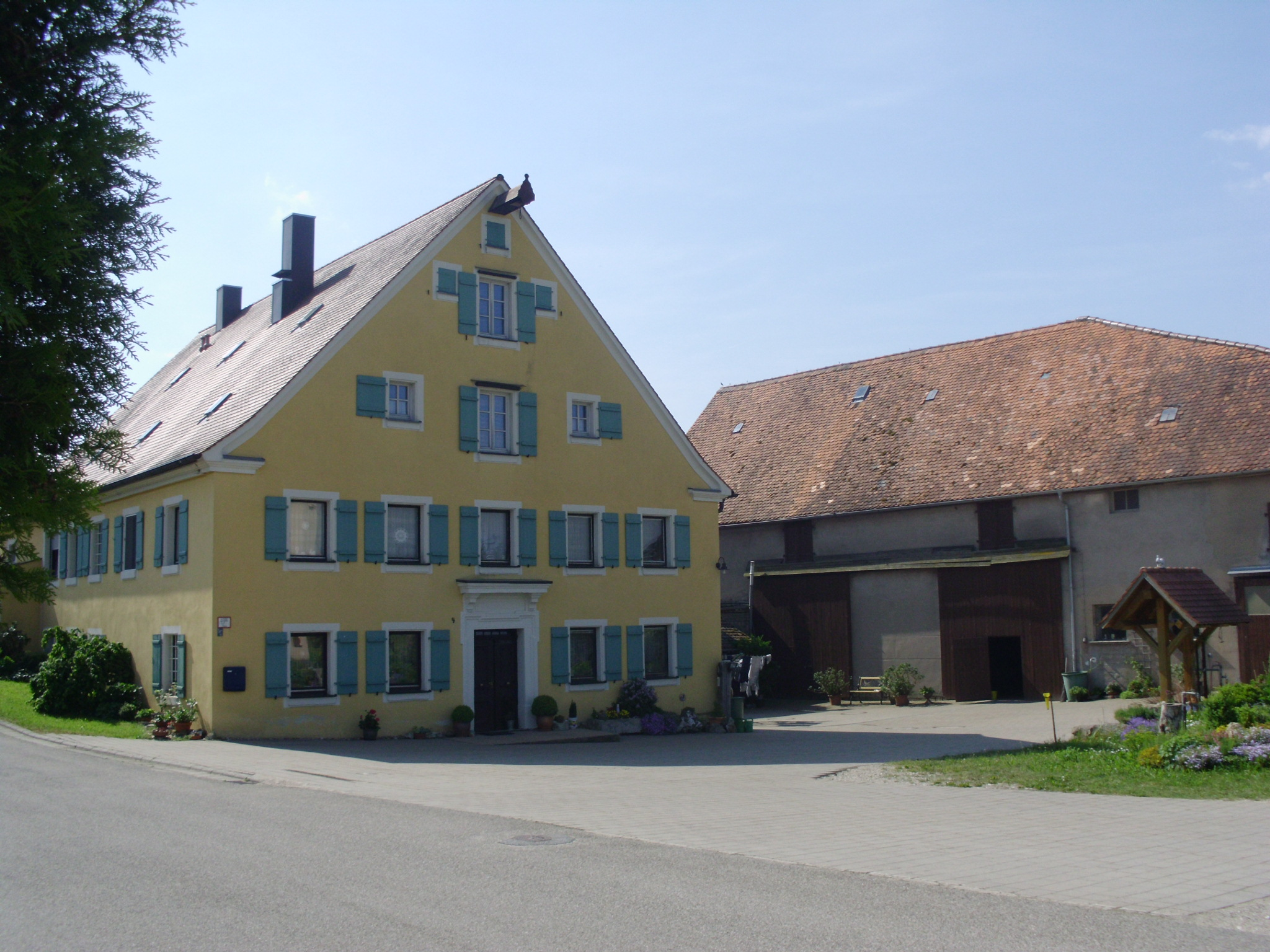 Dürrnhof, Ortsteil von Merkendorf (Mittelfranken), ehemalige Klostermühle